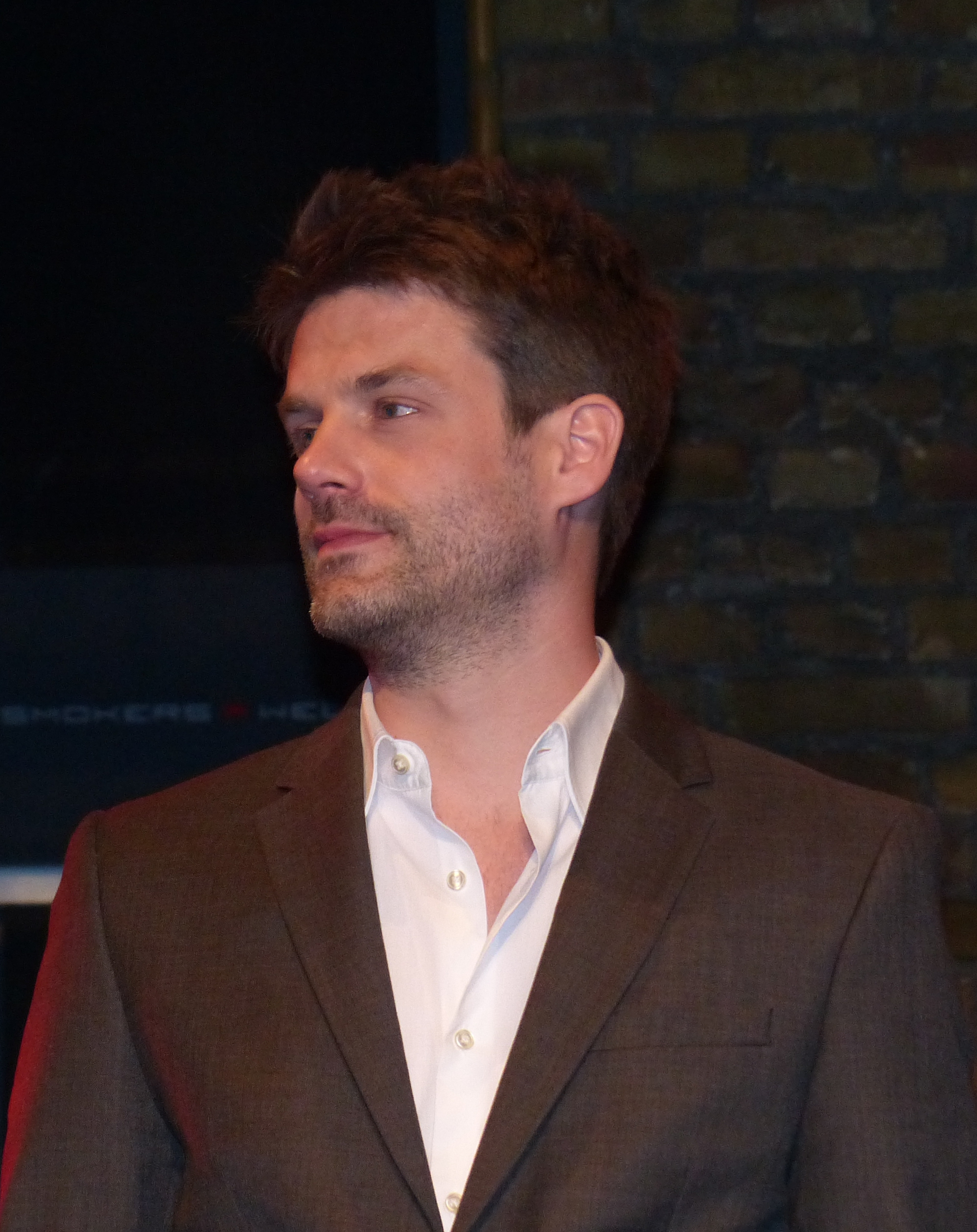 Sebastian Schlemmer, 18. Jahre Verbotene Liebe Party, Düsseldorf